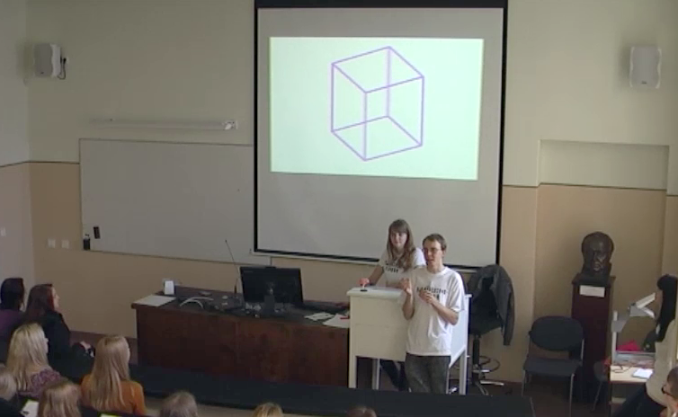 Psühhobuss esinemas.